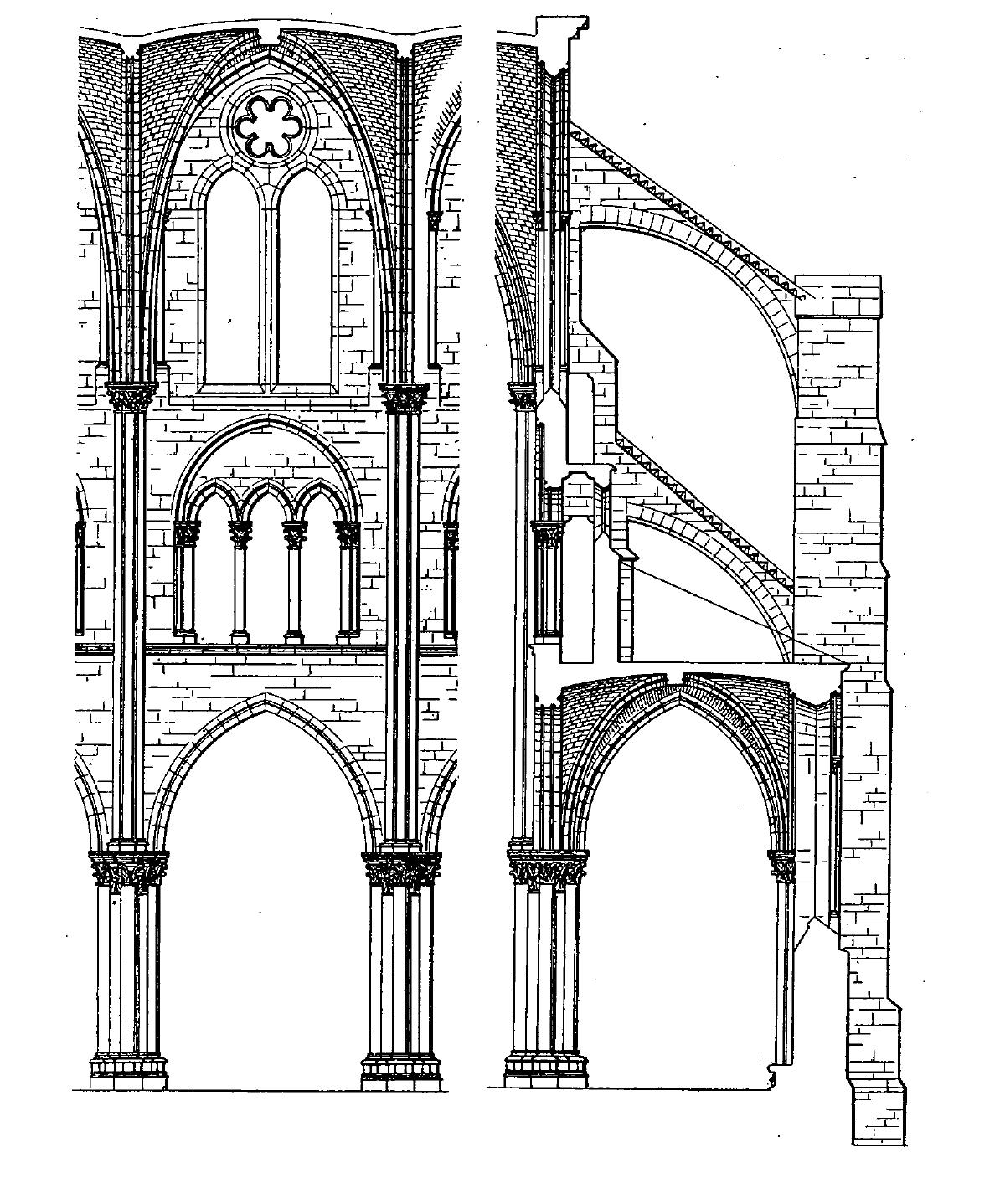 Travée de la nef et coupe du bas-côté sud.